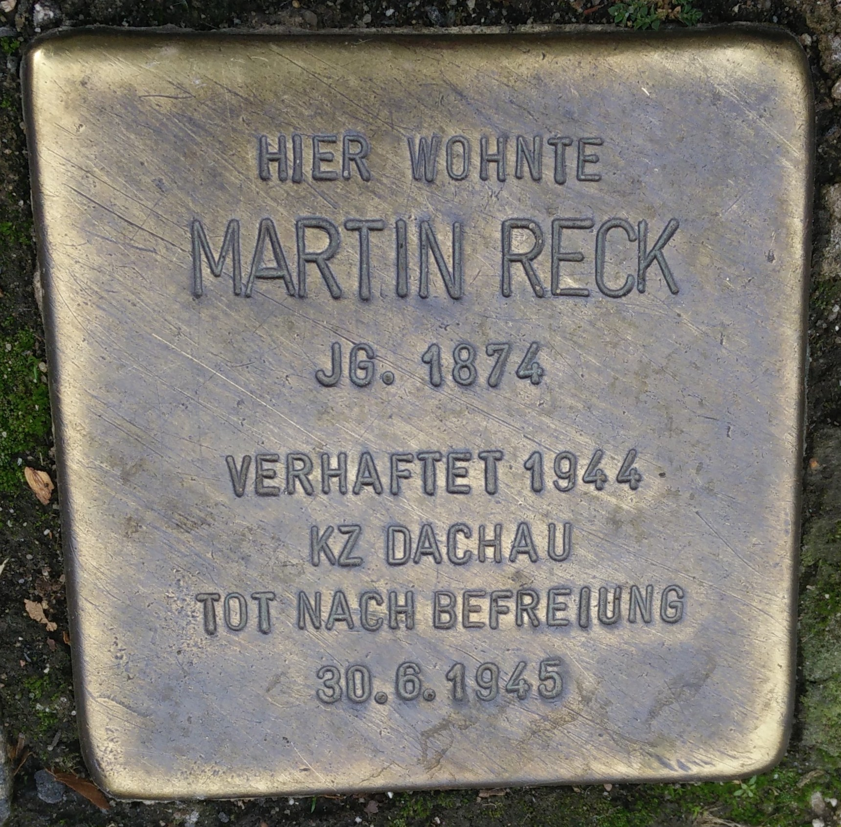 Bad Vilbel, Stolperstein Martin Reck